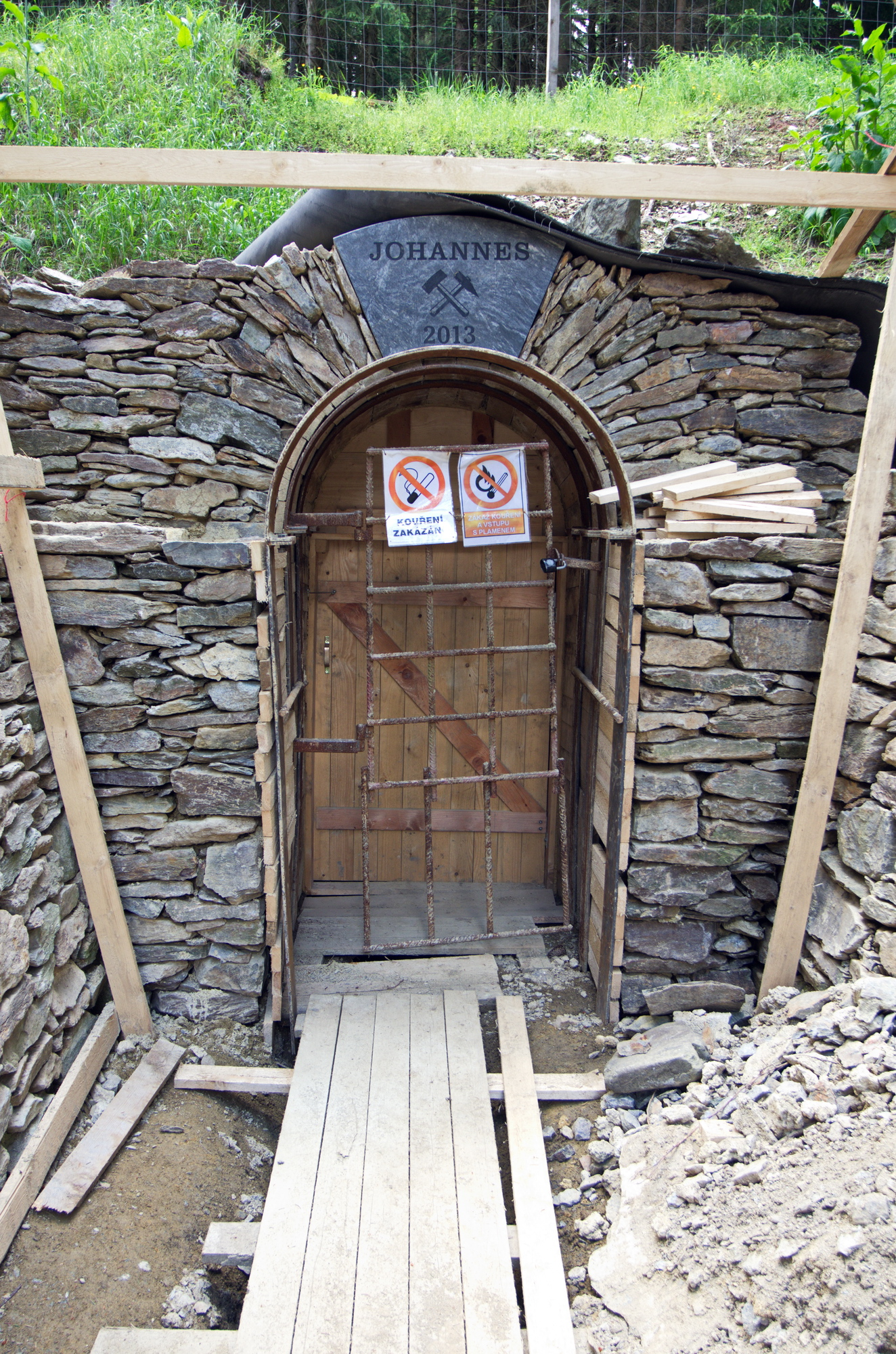 Zlatý Kopec, štola Johannes, okres Karlovy Vary